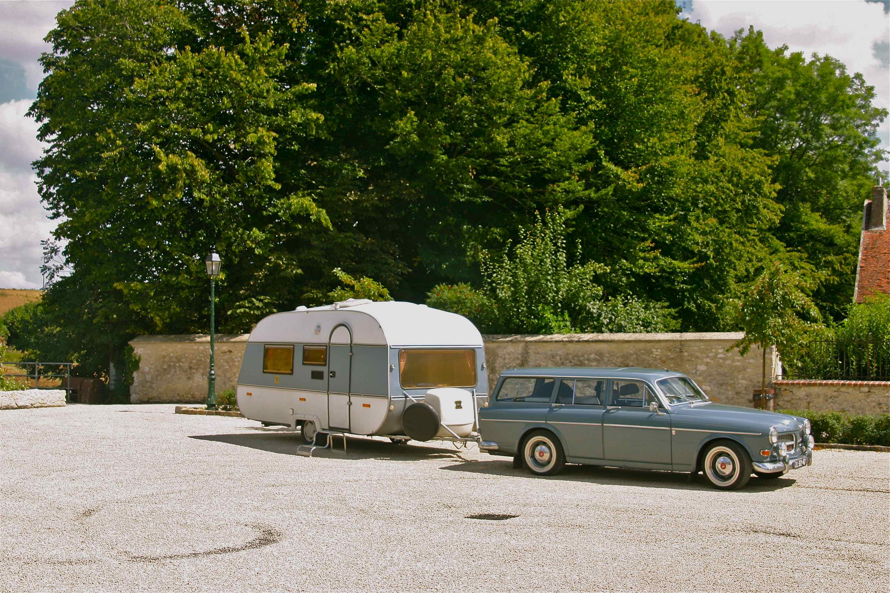 1963 Volvo Estate & 1981 SMV caravan somewhere in France